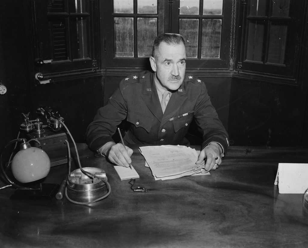 Il generale del VI Corpo d'armata americano Ernest Dawley a Salerno